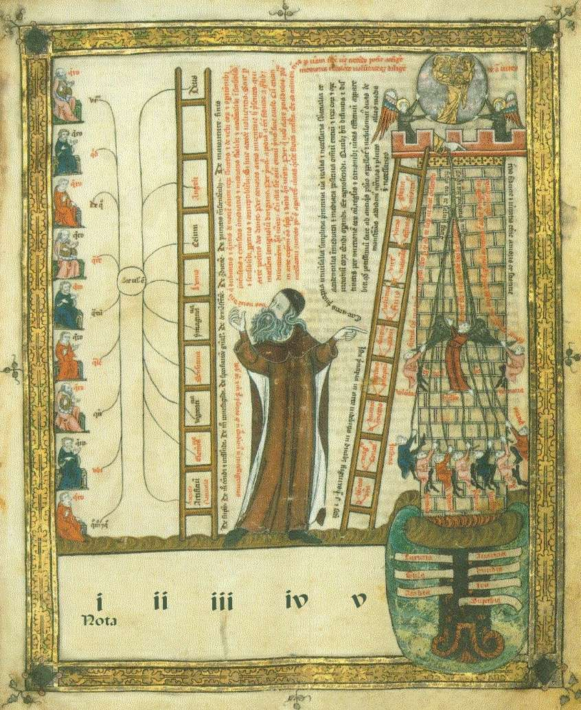 Miniatura del Breviculum ex artibus de Ramon Llull